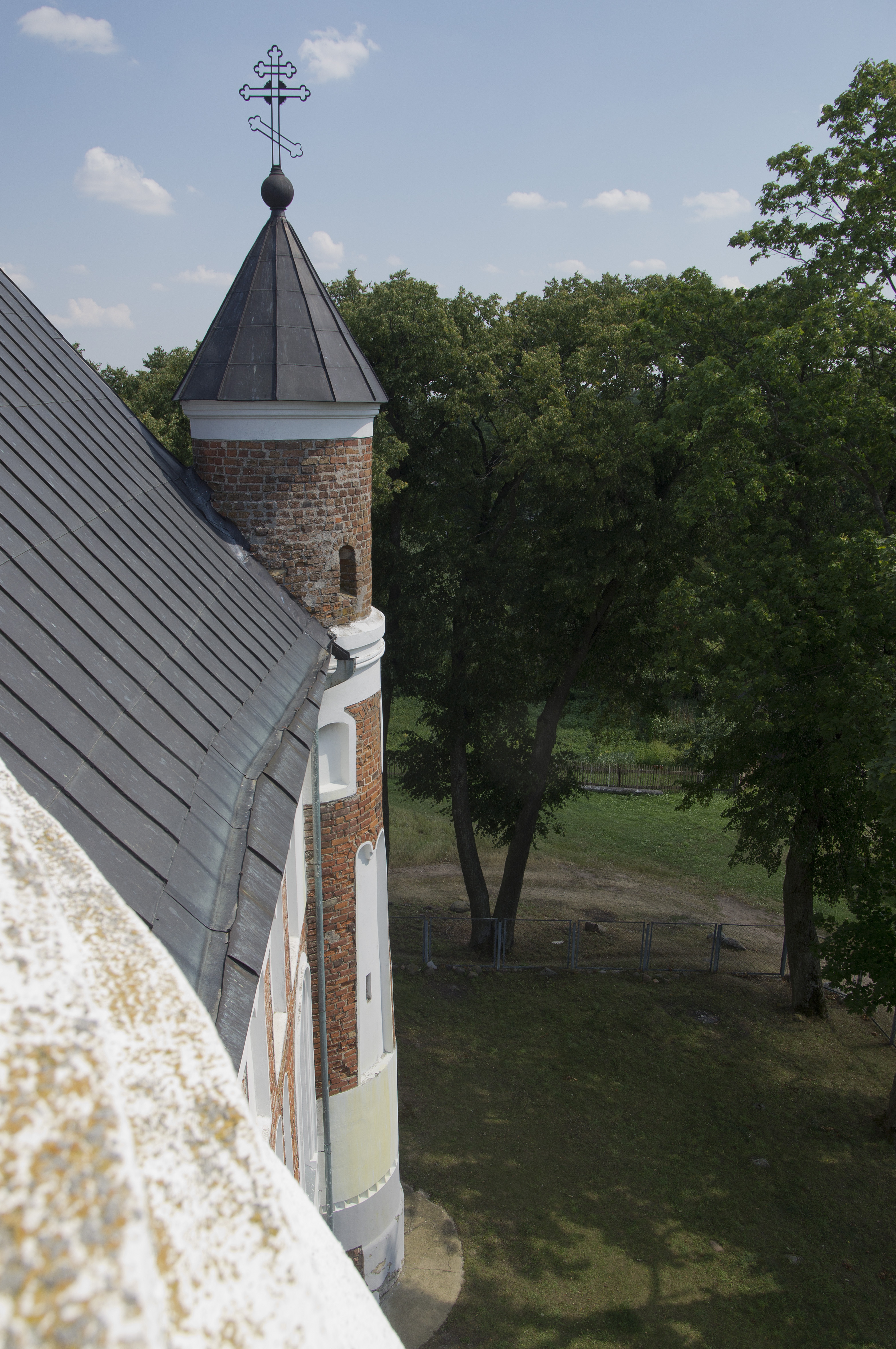 Сьвята-Раства-Багародзіцкая царква(крэпасьць абарончага тыпу) This is a photo of Belarusian heritage monument. Reference number: 410Г000638 ( WLM)